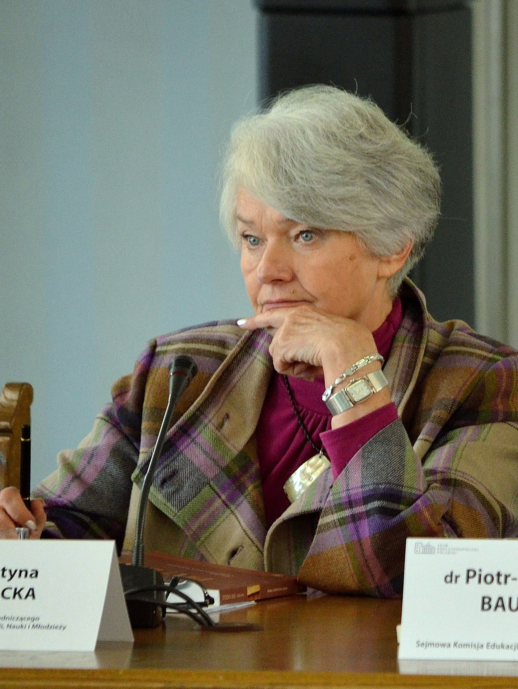 Krystyna Łybacka. Konferencja „Nauka i szkolnictwo wyższe – wyzwania współczesności” w Sejmie RP.